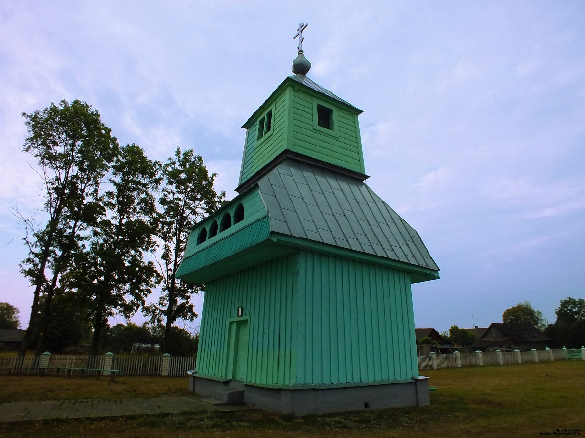 Чэрск. Свята-Міхайлаўская царква. Званіца